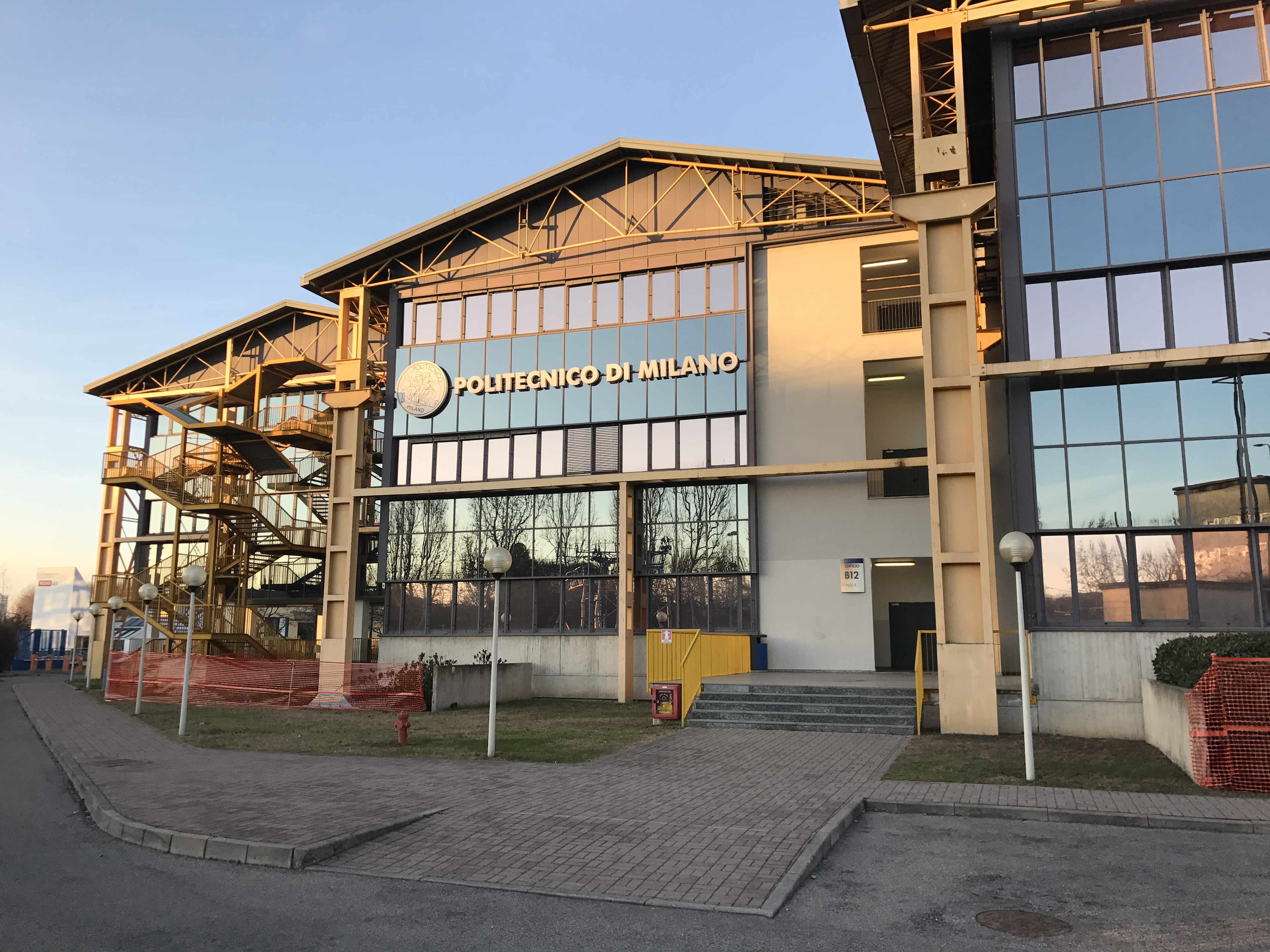 Politecnico di Milano, campus Bovisa La Masa.